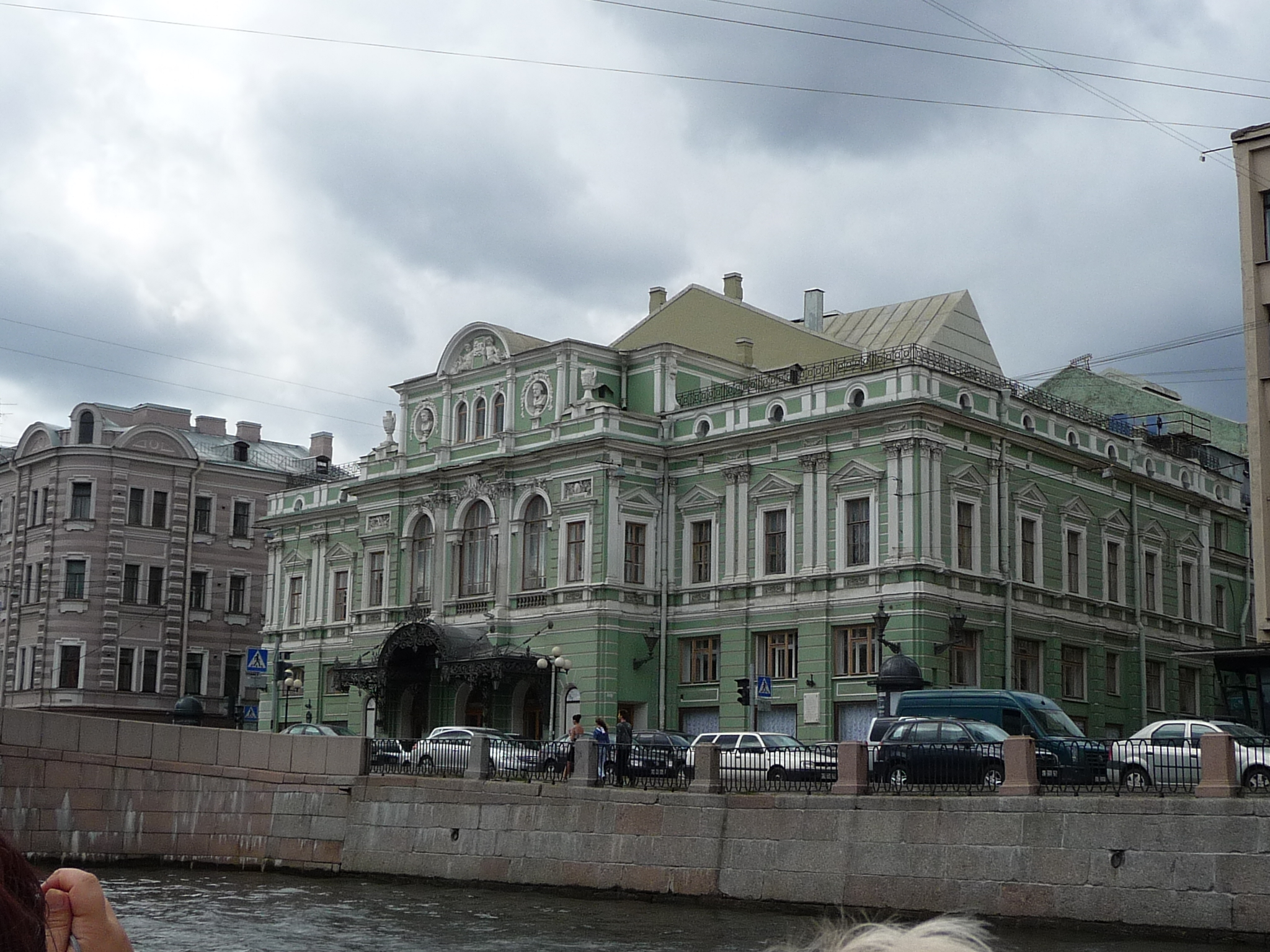 Palace-p1030655.jpg